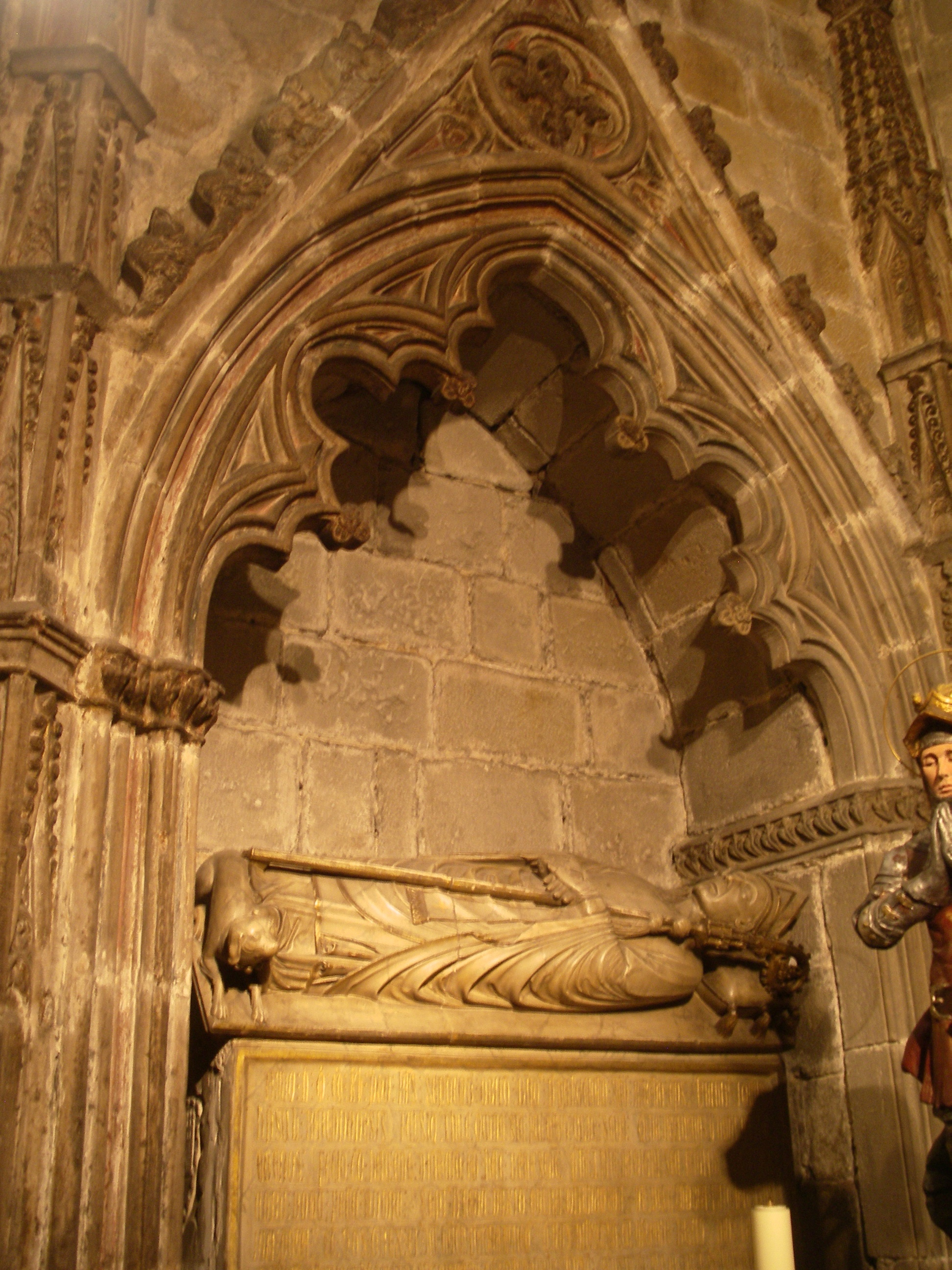 Sepulcre del bisbe Berenguer de Palou, a la Catedral de Barcelona